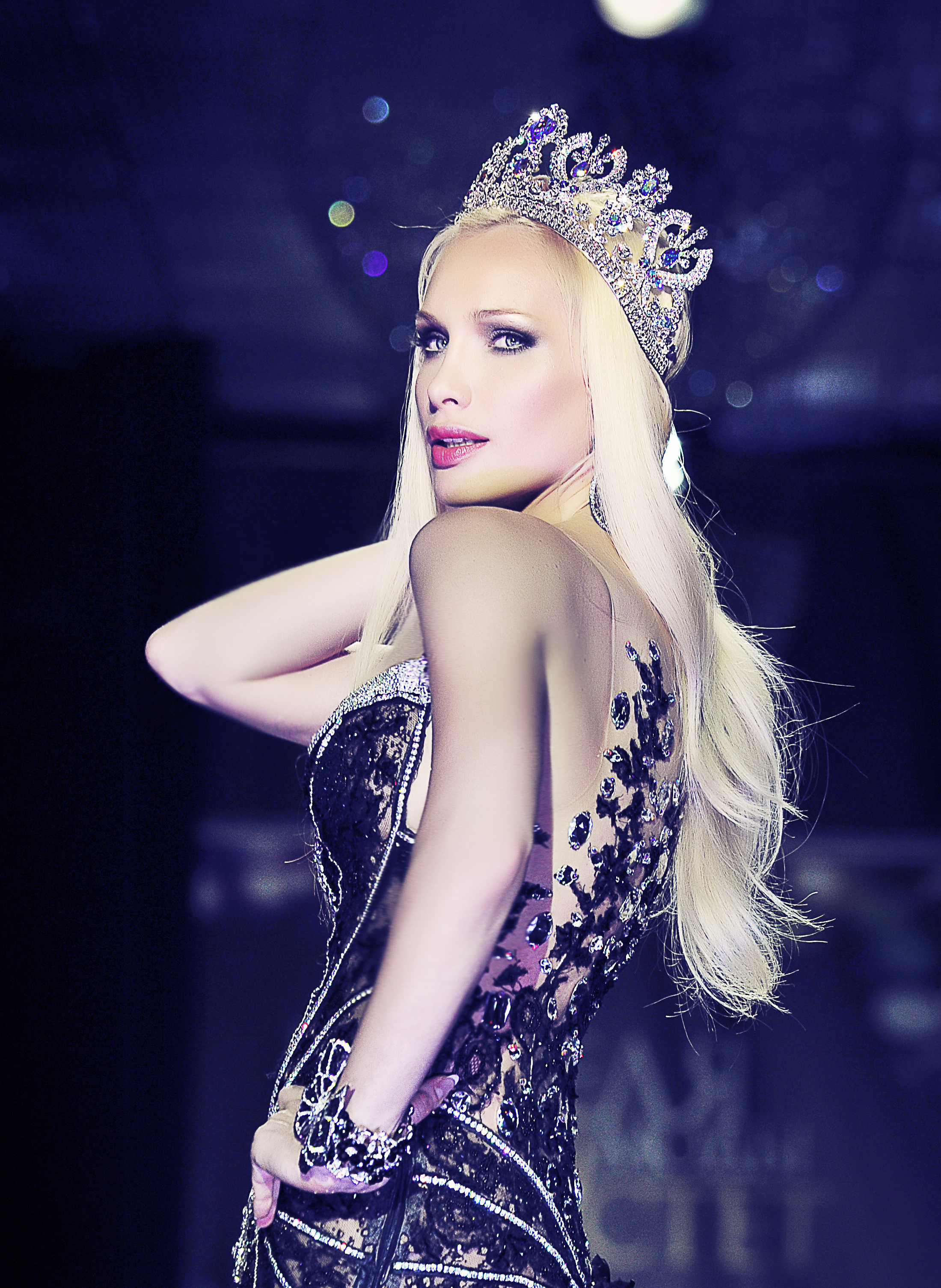 Mrs. Globe